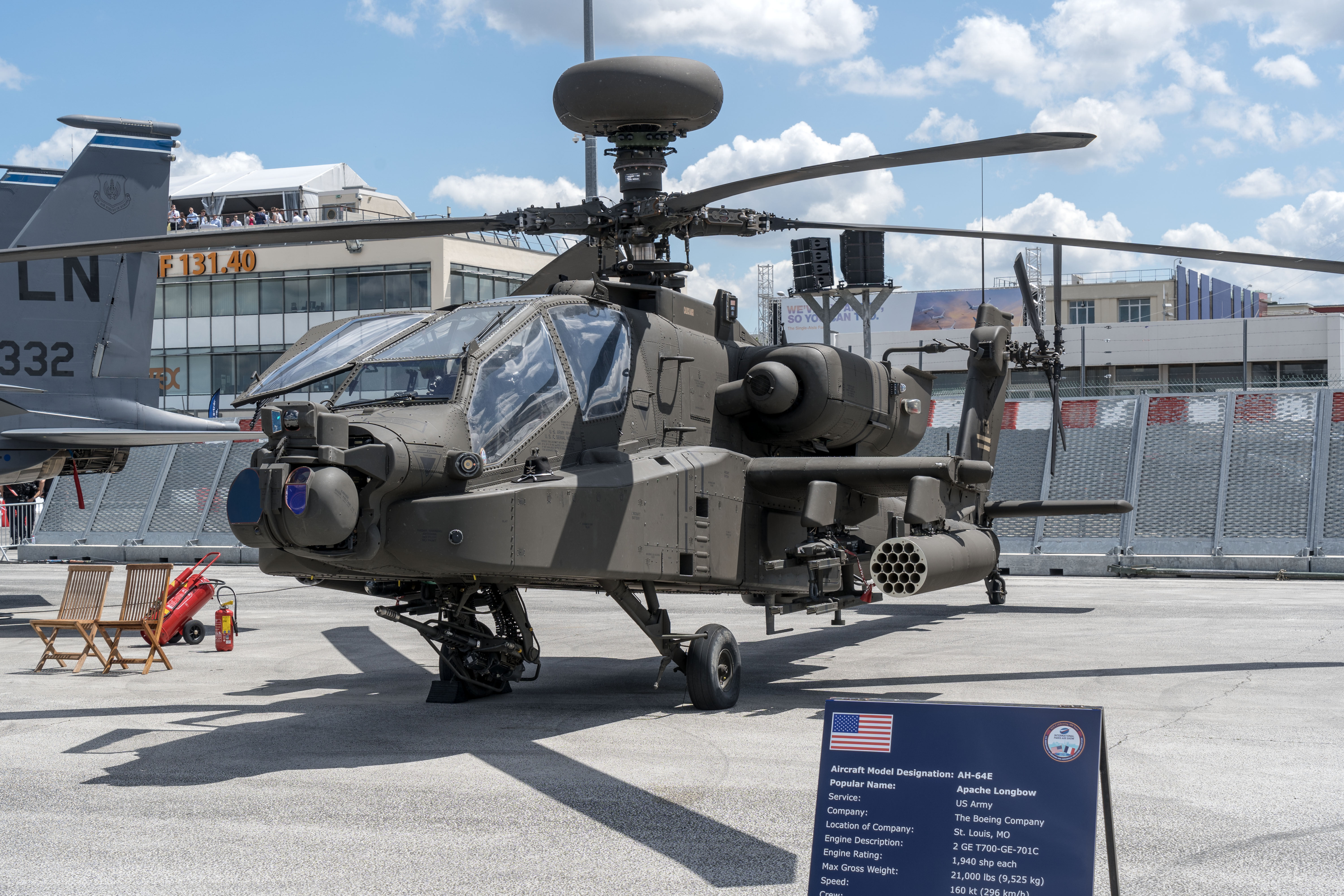 Apahe Longbow AH64E, Bourget 2019